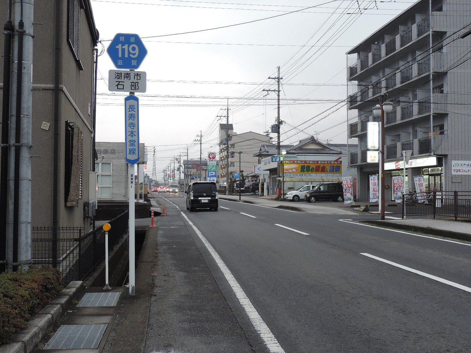 滋賀県道119号長寿寺本堂線。湖南市石部にて。2017年撮影